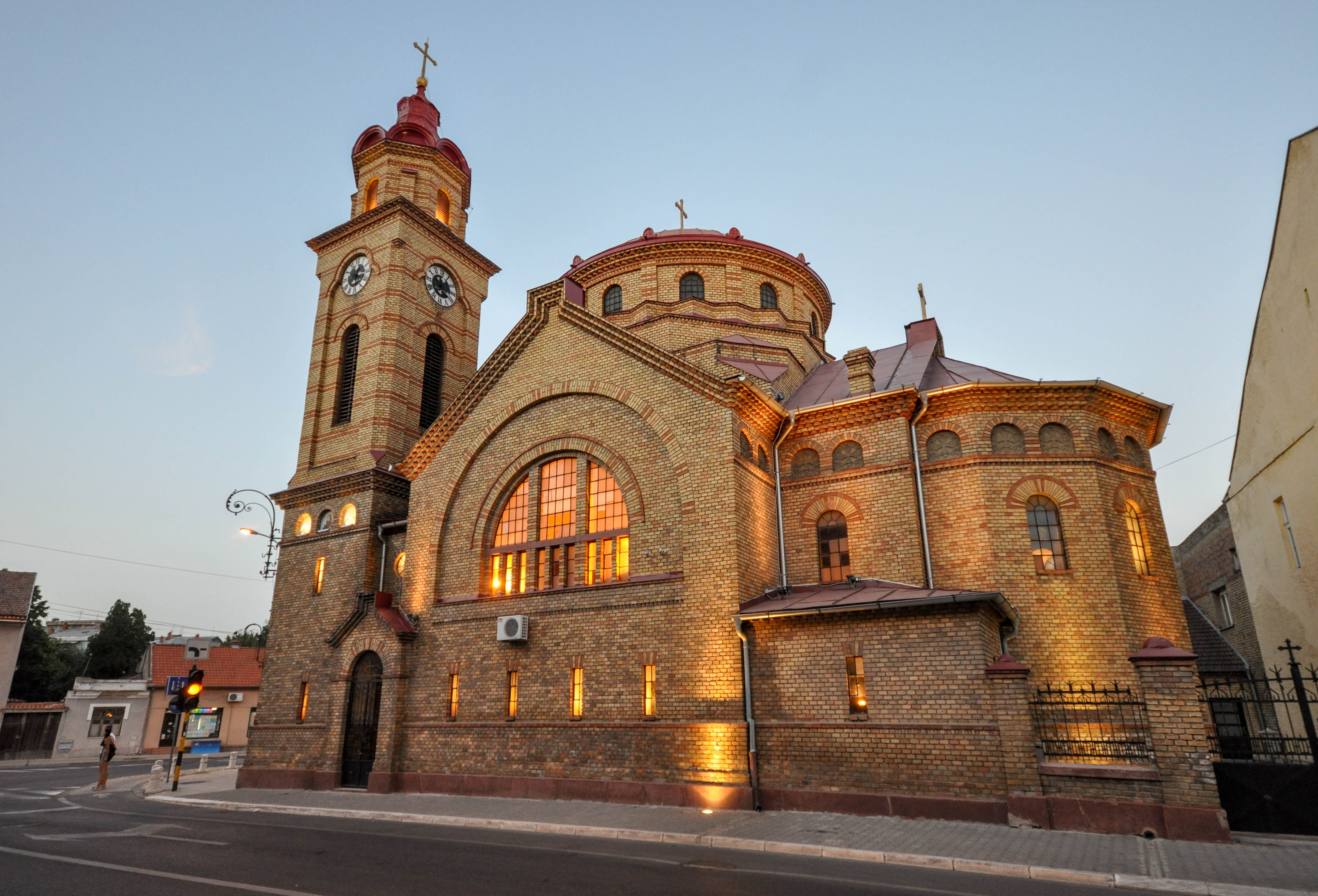 The Romanian Orthodox Cathedral (Romanian: Catedrala Înălţarea Domnului din Vârşeţ) is a cathedral in Vršac, Vojvodina, Serbia, consecrated in 1912